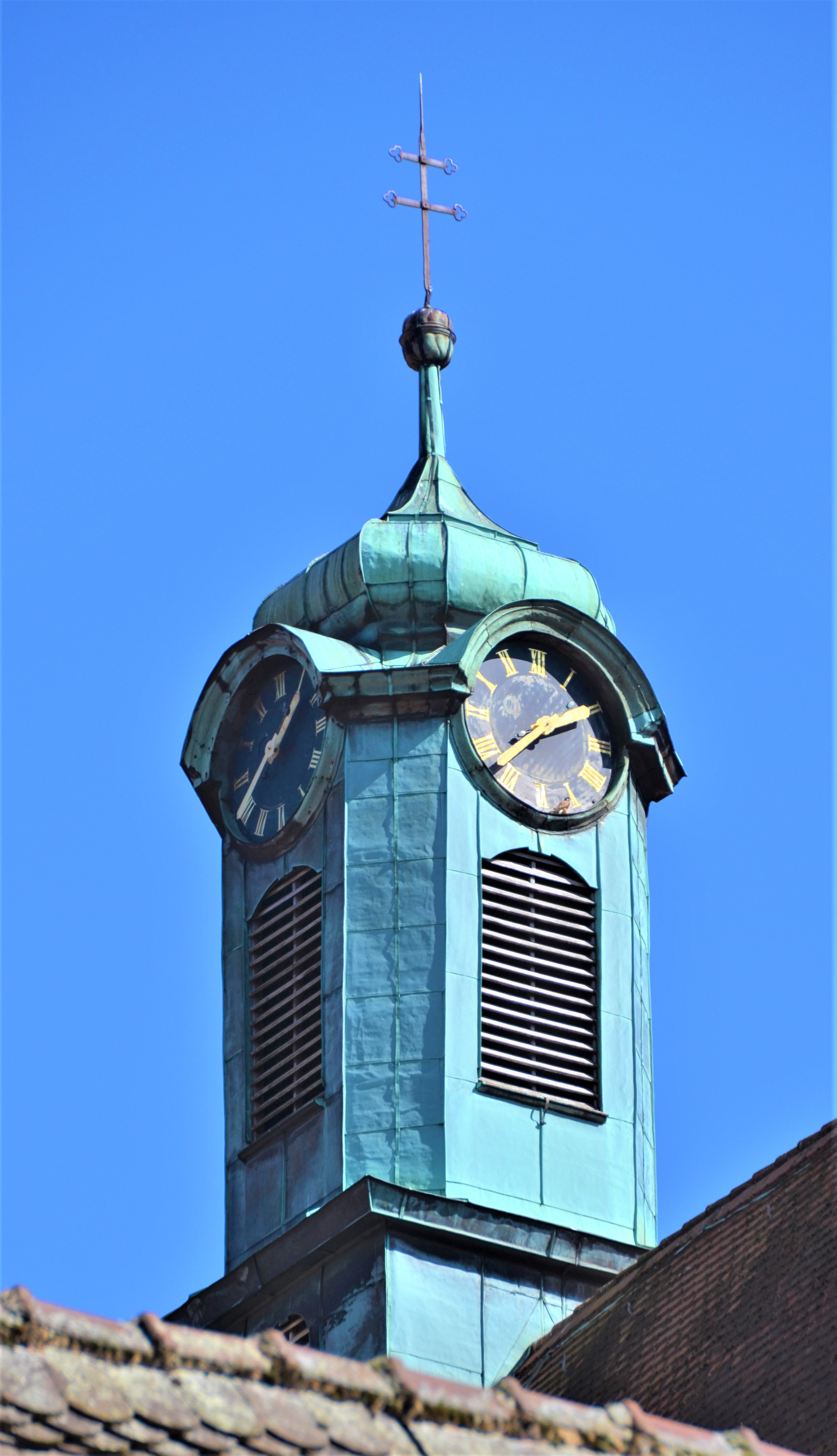 Dachreiter des Heilig-Kreuz-Münsters in Schwäbisch Gmünd, Aufnahme von Nordwest